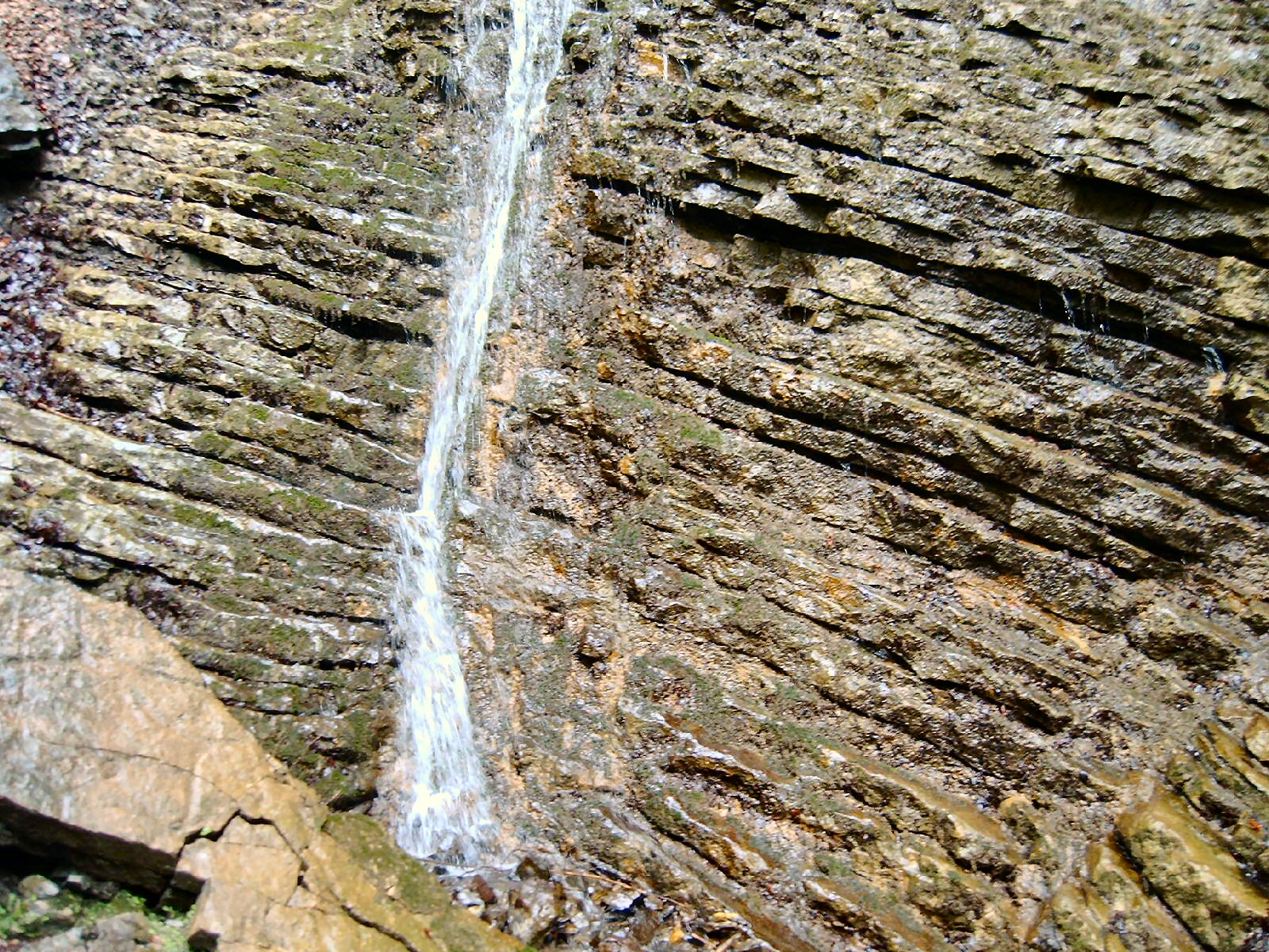 Schichten von Alpinem Muschelkalk in der Partnachklamm Selbst fotografiert am 18.05.2005: GNU-FDL